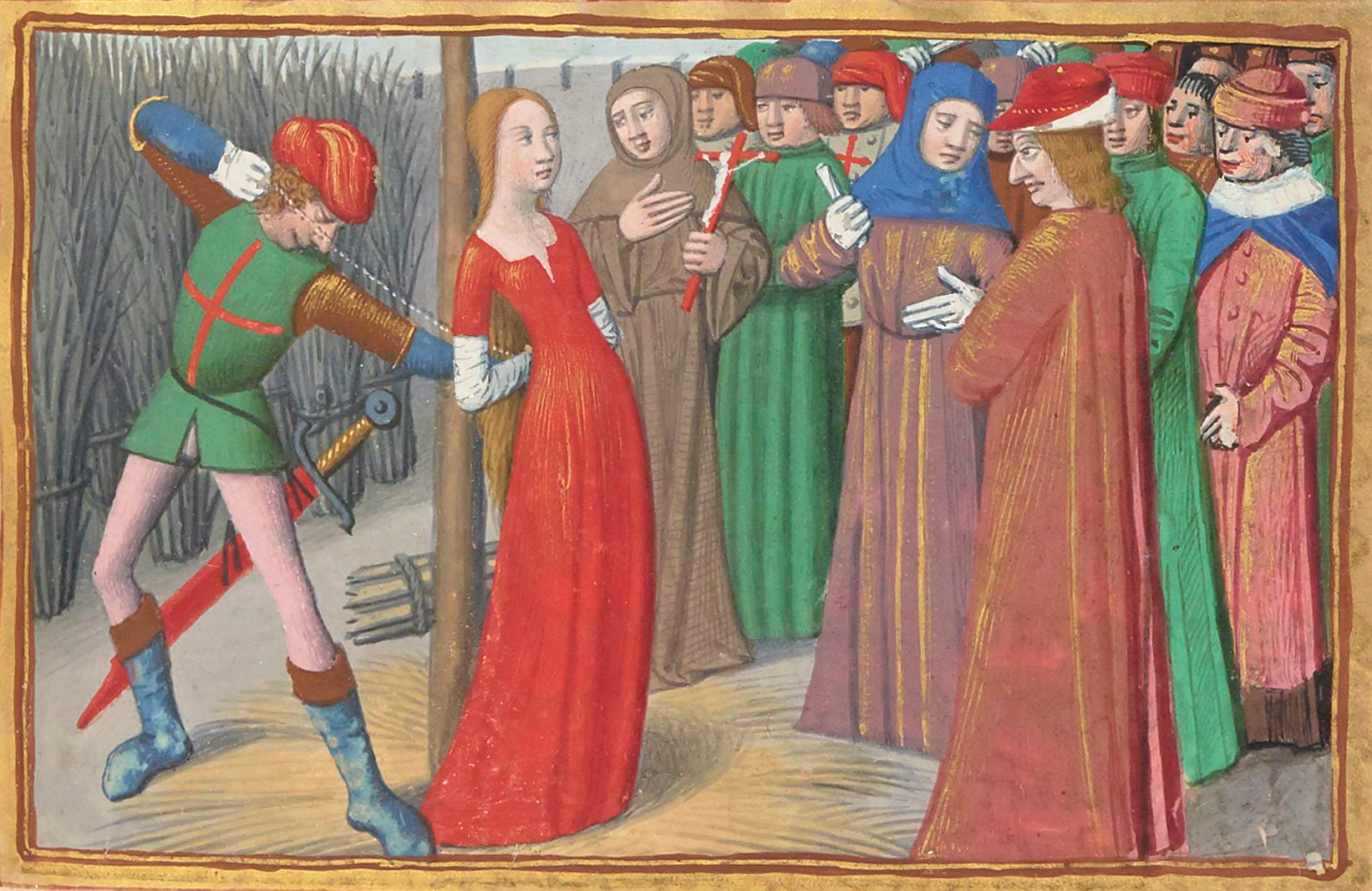 La capture de Jeanne d'Arc par les Bourguignons lors du siège de Compiègne, le 14 mai 1430.